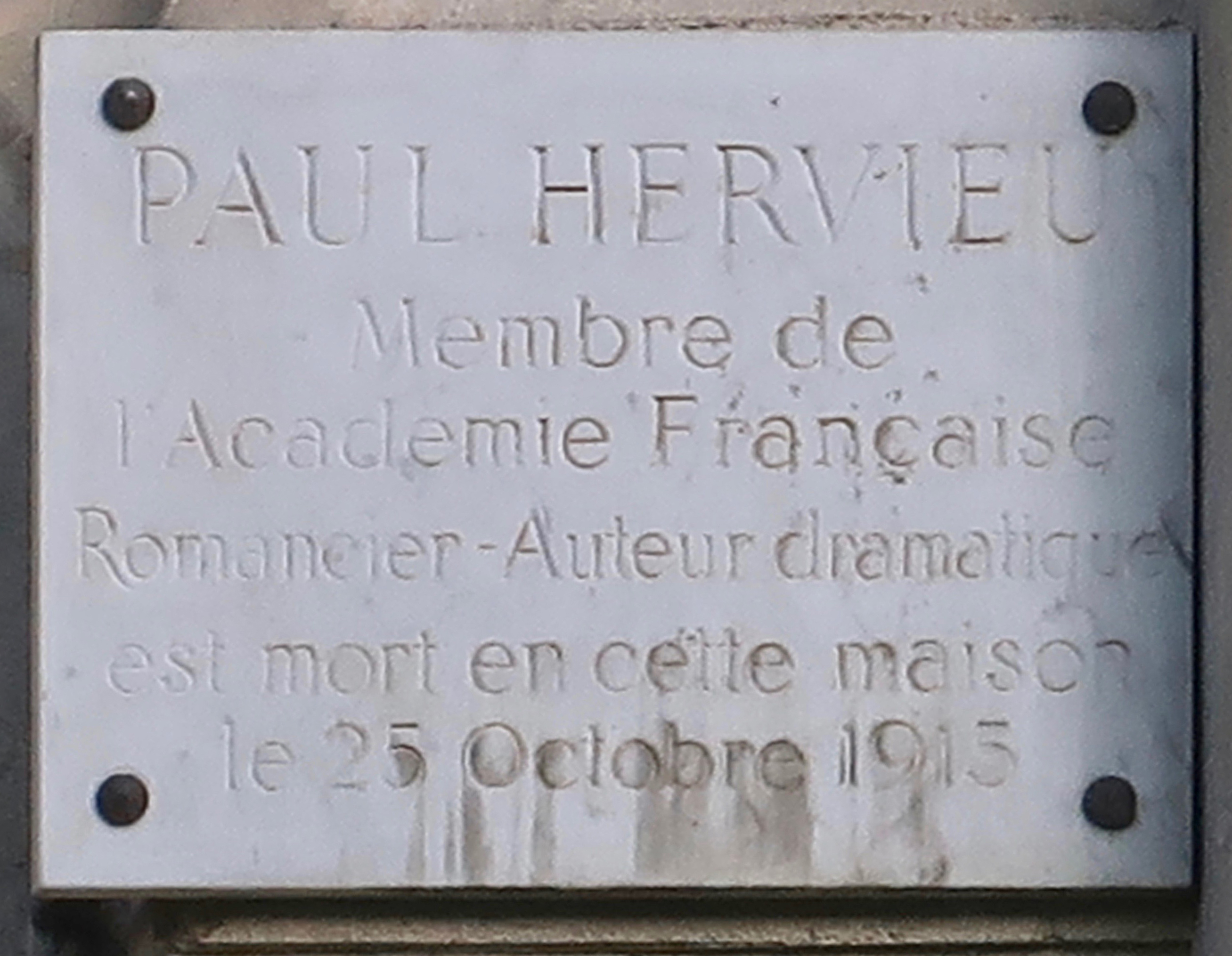 Plaque en hommage à Paul Hervieu, mort dans cet immeuble, 7 avenue Foch (Paris, 16e).